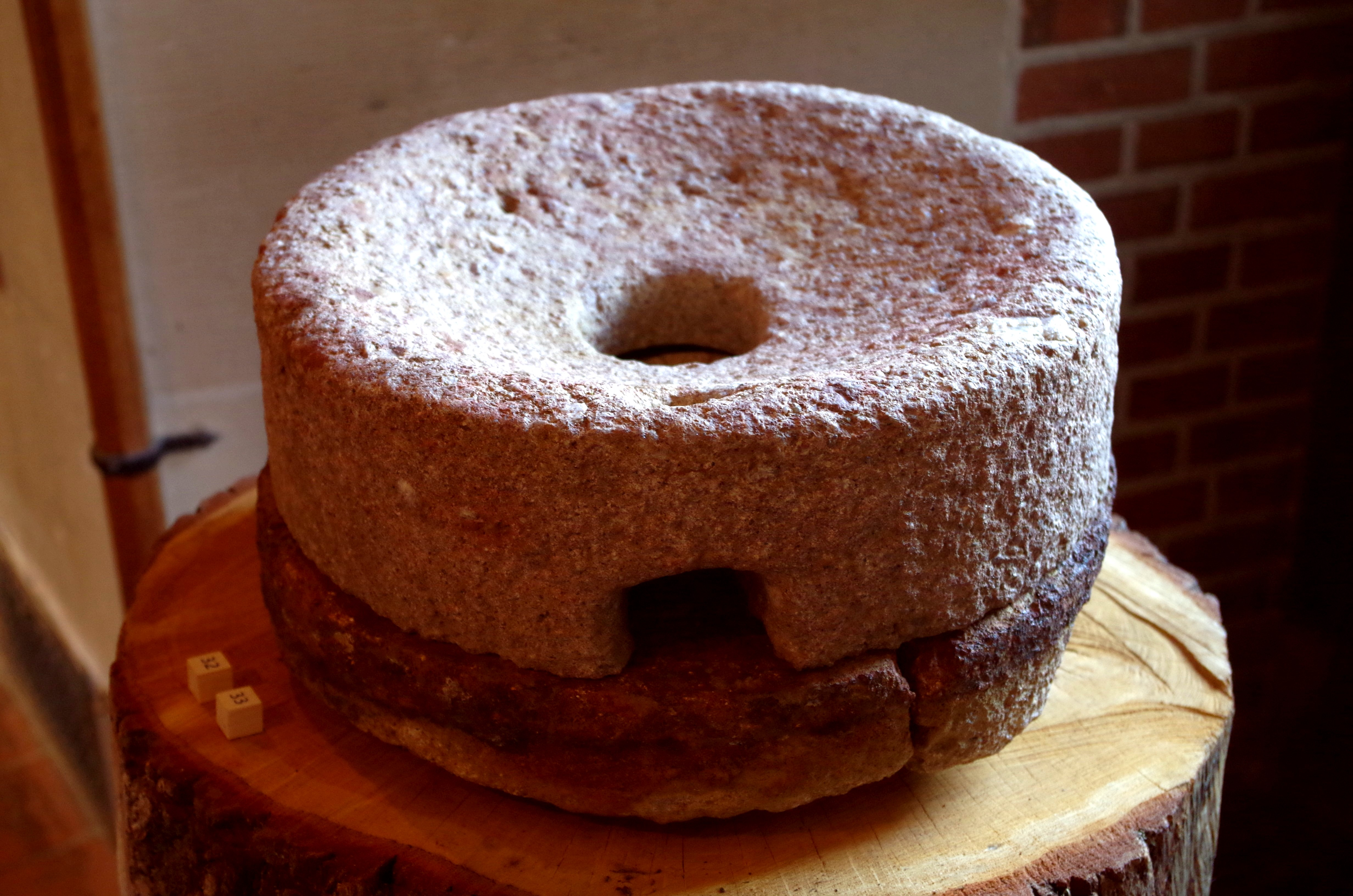 Meule trouvée à Amboise. Voir Jean-Marie Laruaz (dir.), Ambacia, la Gauloise - 100 objets racontent la ville antique d'Amboise, Chemillé-sur-Dême, Archéa, 2017, p. 71.